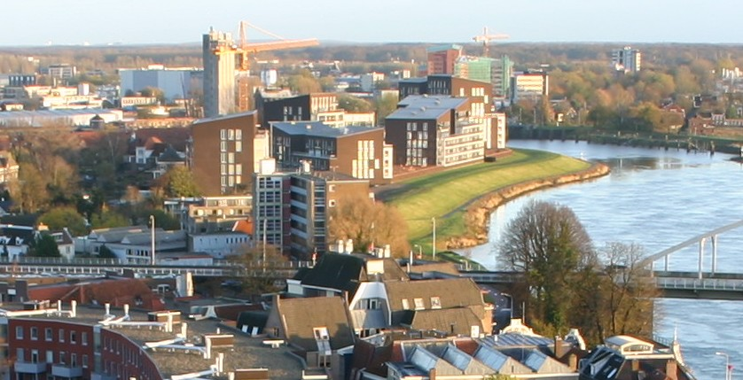 Eigen foto van Pothoofdflats dd nov 2004. Laatste fase bouw. Vanaf Lebuïnustoren